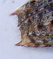 detail for determination Pogonocherus hispidulus, Doppeldorniger Wimpernbock